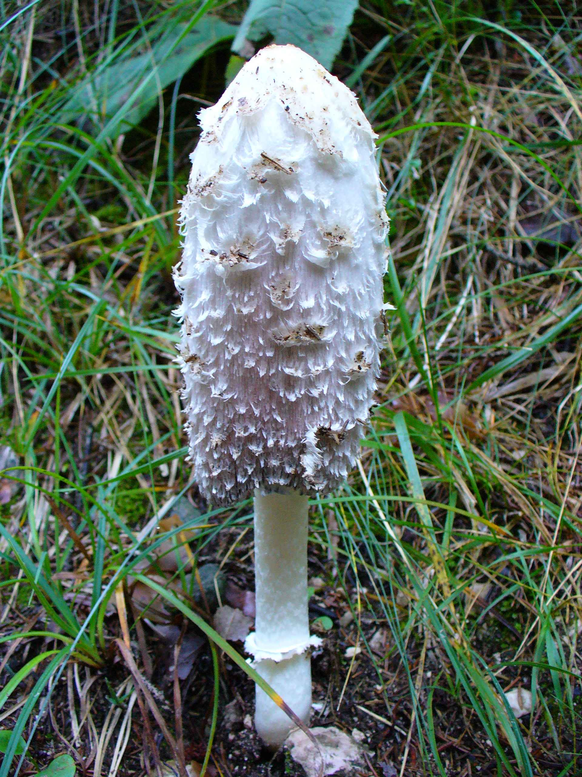 Coprinus Comatus